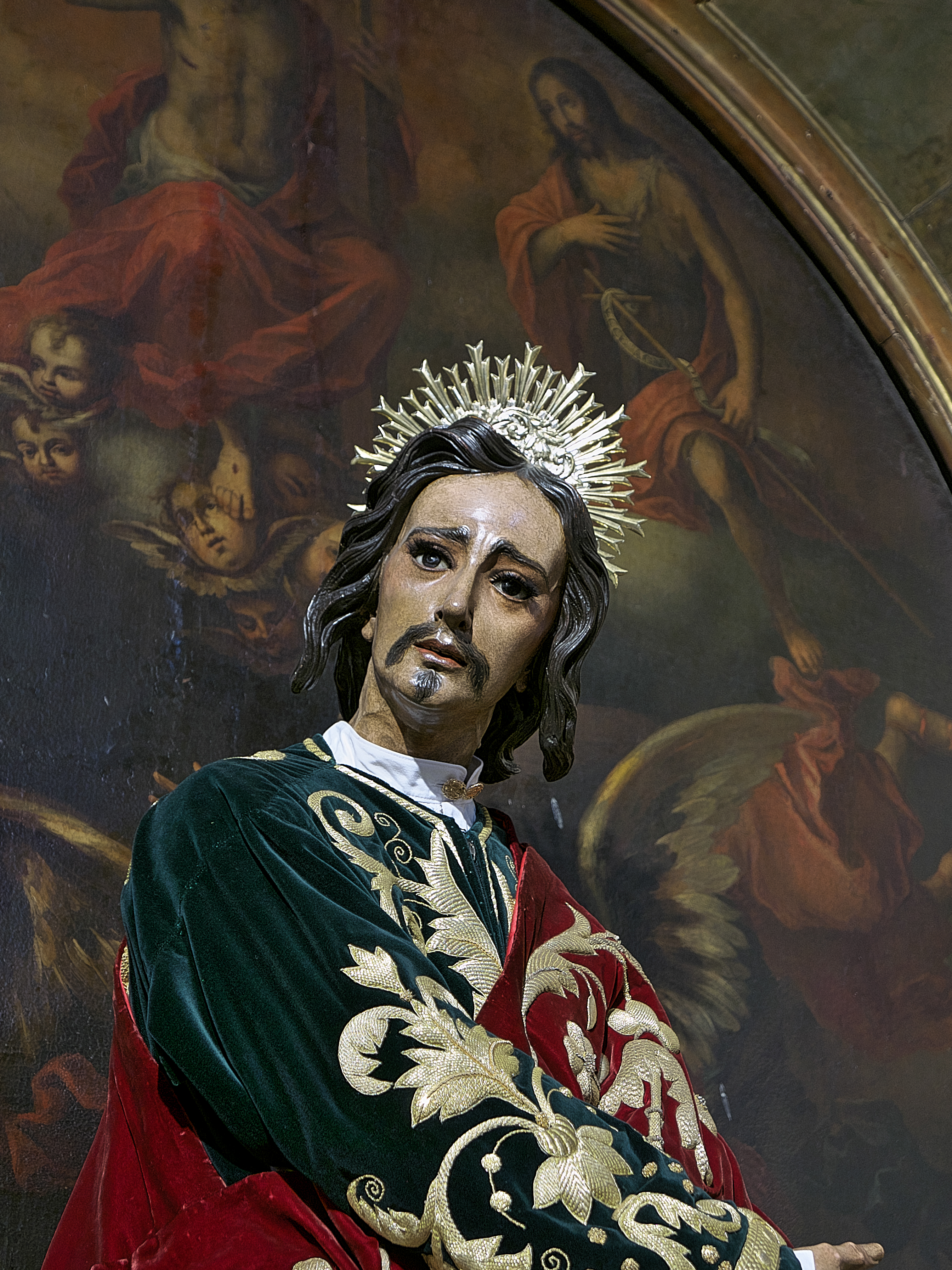 Iglesia de San Juan de la Palma (Sevilla). Benito de Hita y Castillo talla (1760) San Juan Evangelista para la Hermandad de la Amargura (Sevilla).